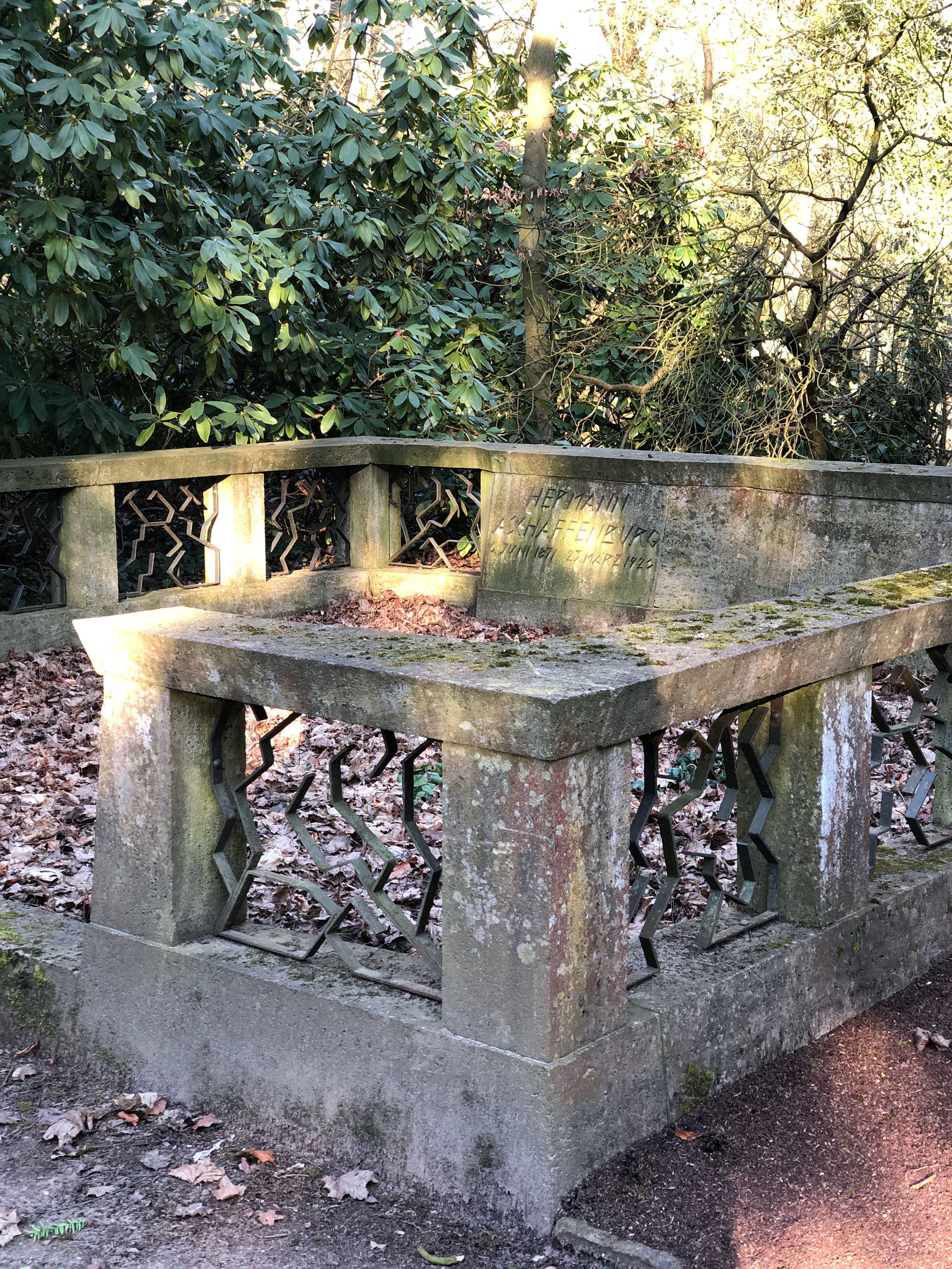 Grabmal der Familie Aschaffenburg in Mönchengladbach. 1922 Entworfen von Otto Bartning.